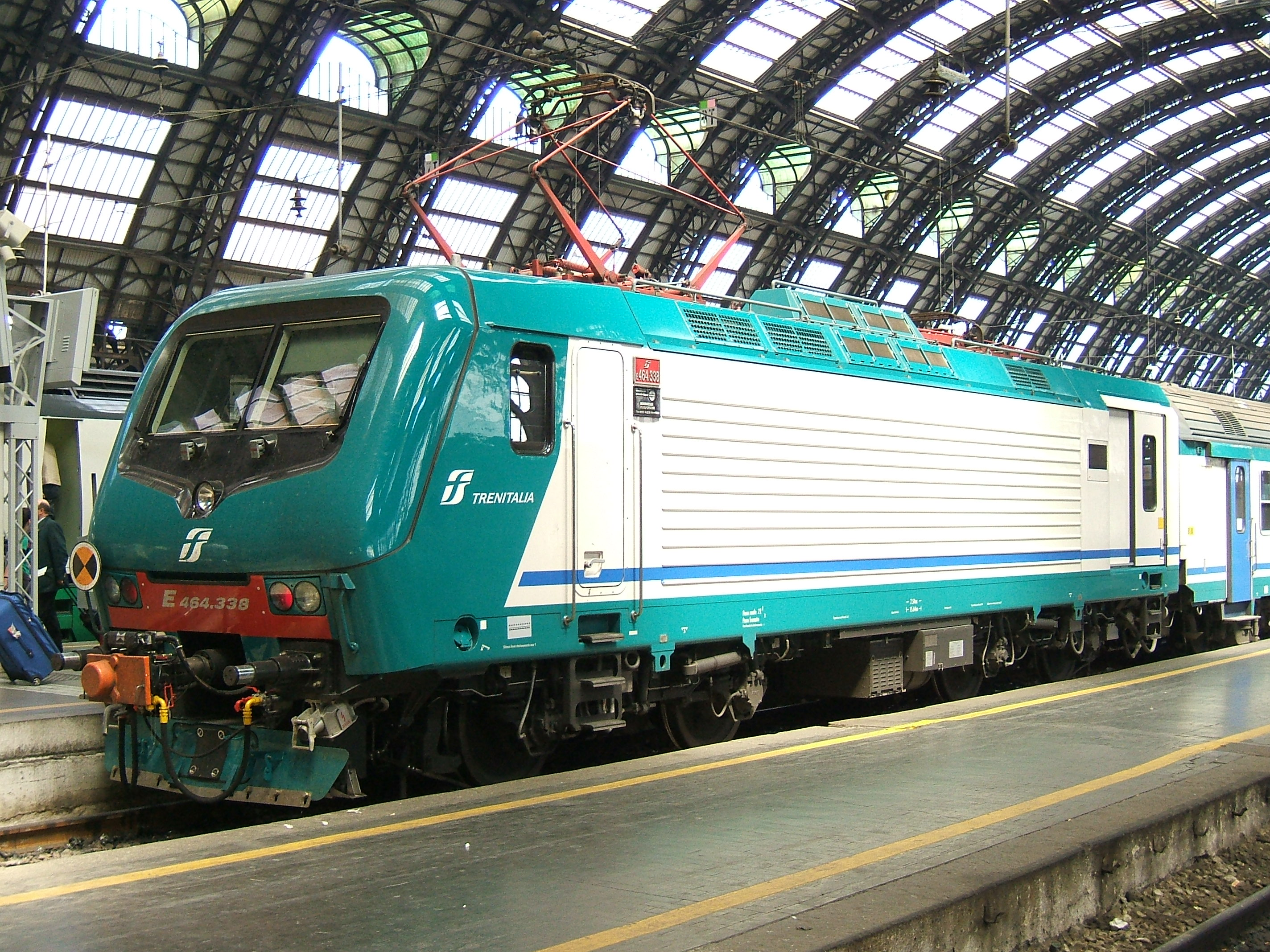 FS gruppo E464